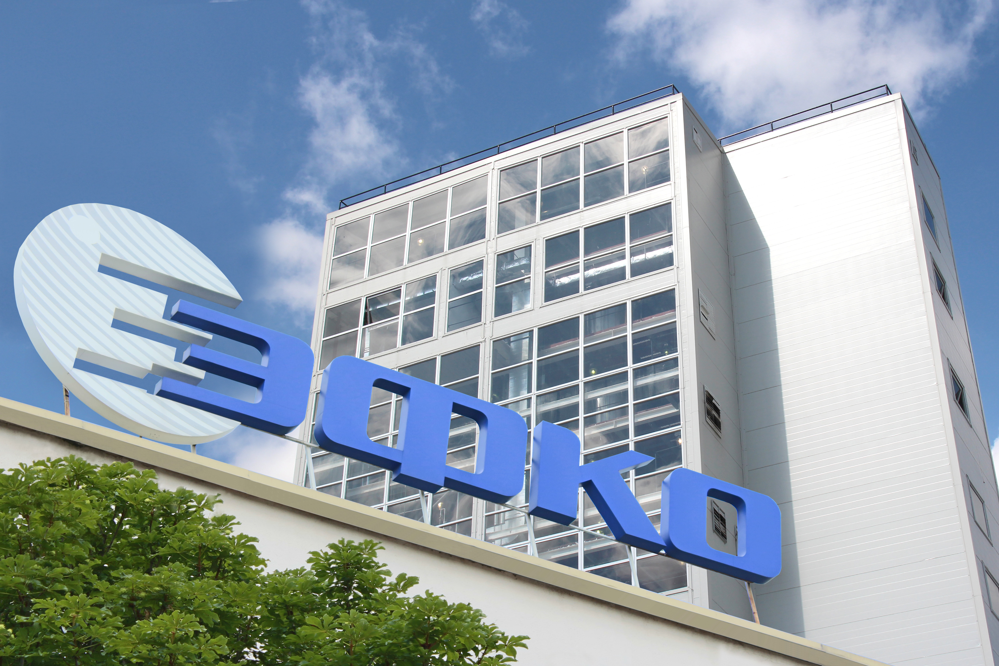 Фото здания управляющей компании